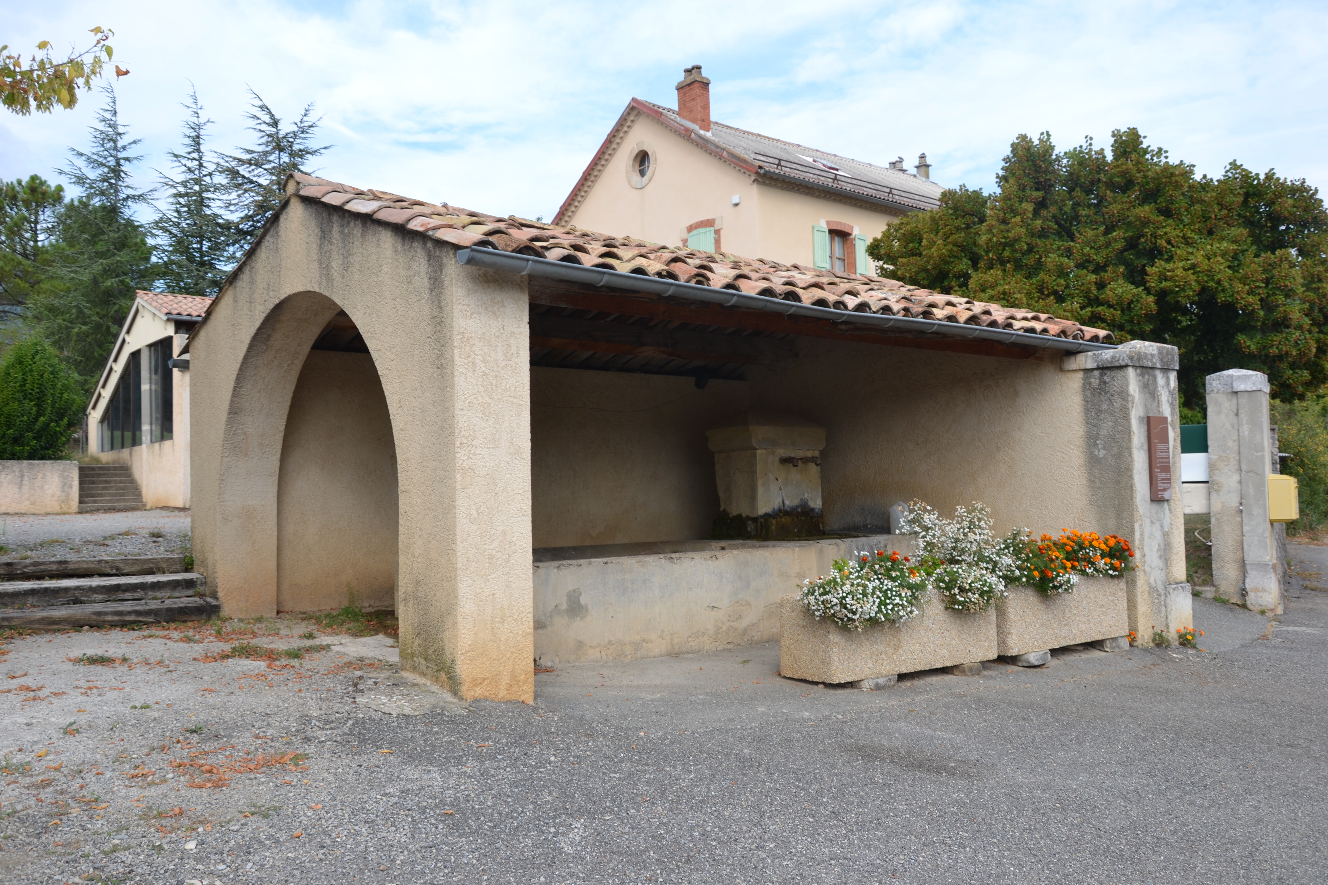 Lavoir de Meuil